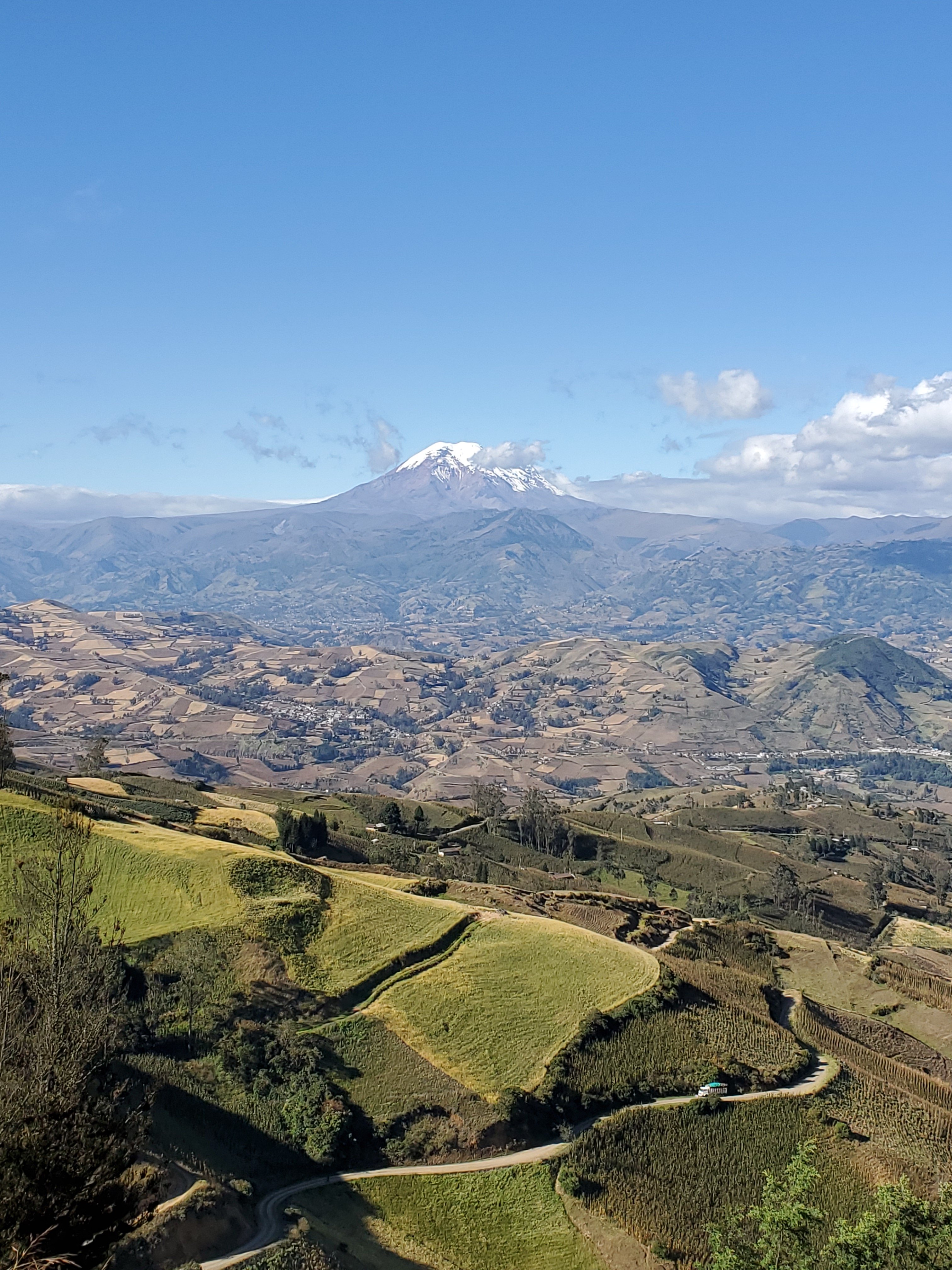 Volcán Chimborazo